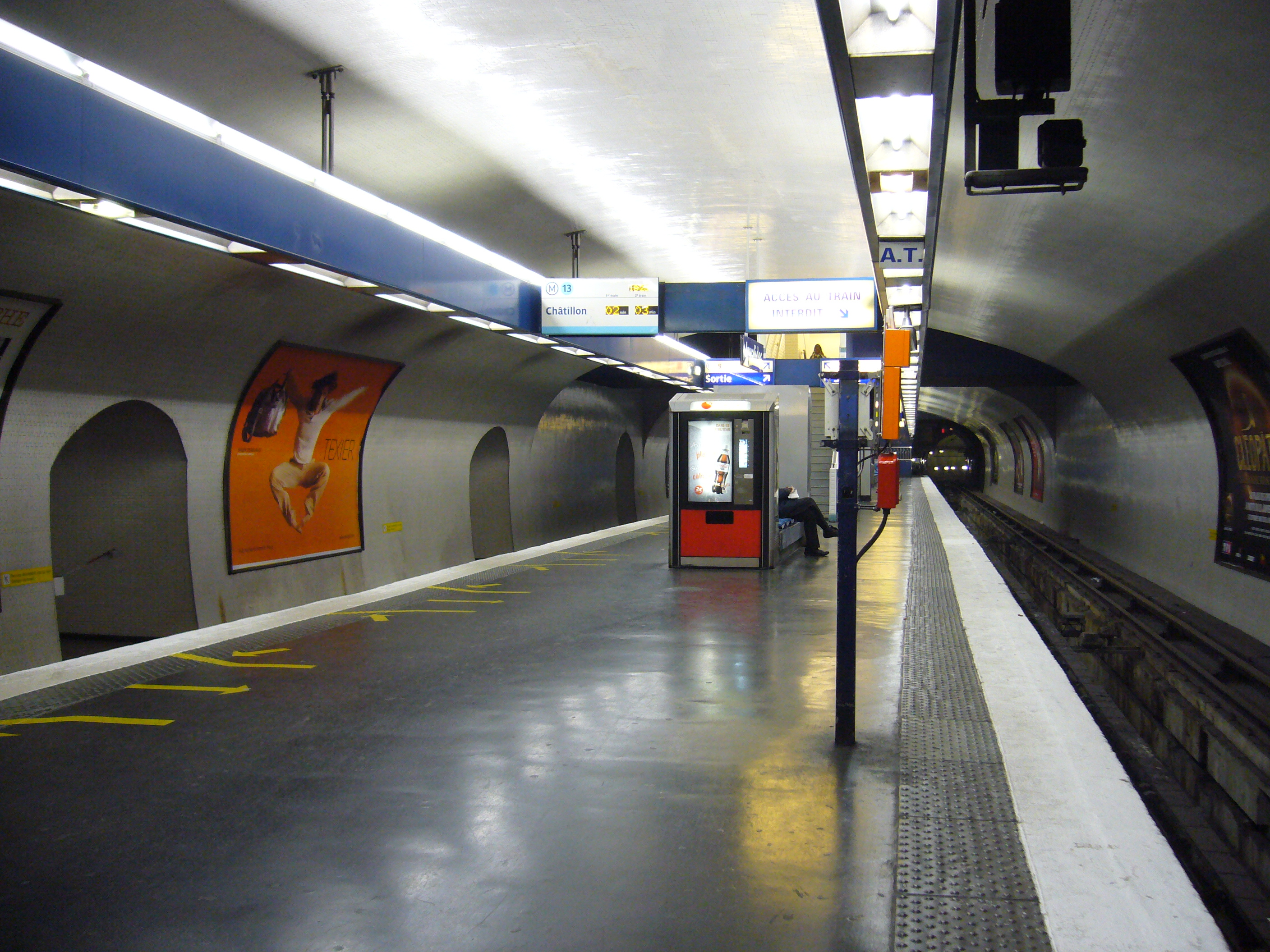 Vue de la voie de garage (à droite) à la station Invalides sur la ligne 13 du métro de Paris.